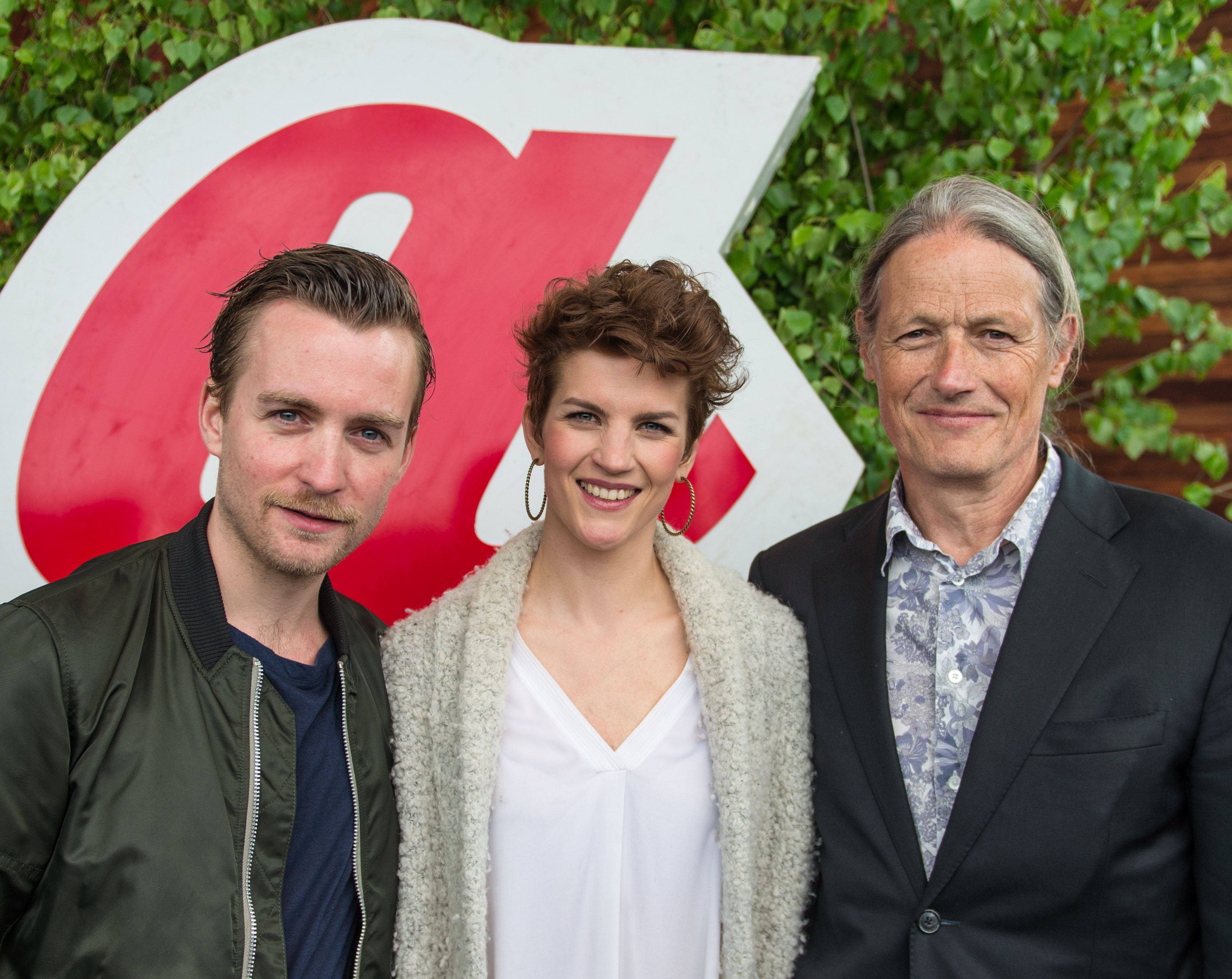 Robert Noack, Maria Ylipää och Lars Lars Rudolfsson från musikalen Kristina från Duvemåla presenteras den 10 juni 2015 på Skansen i Stockholm.